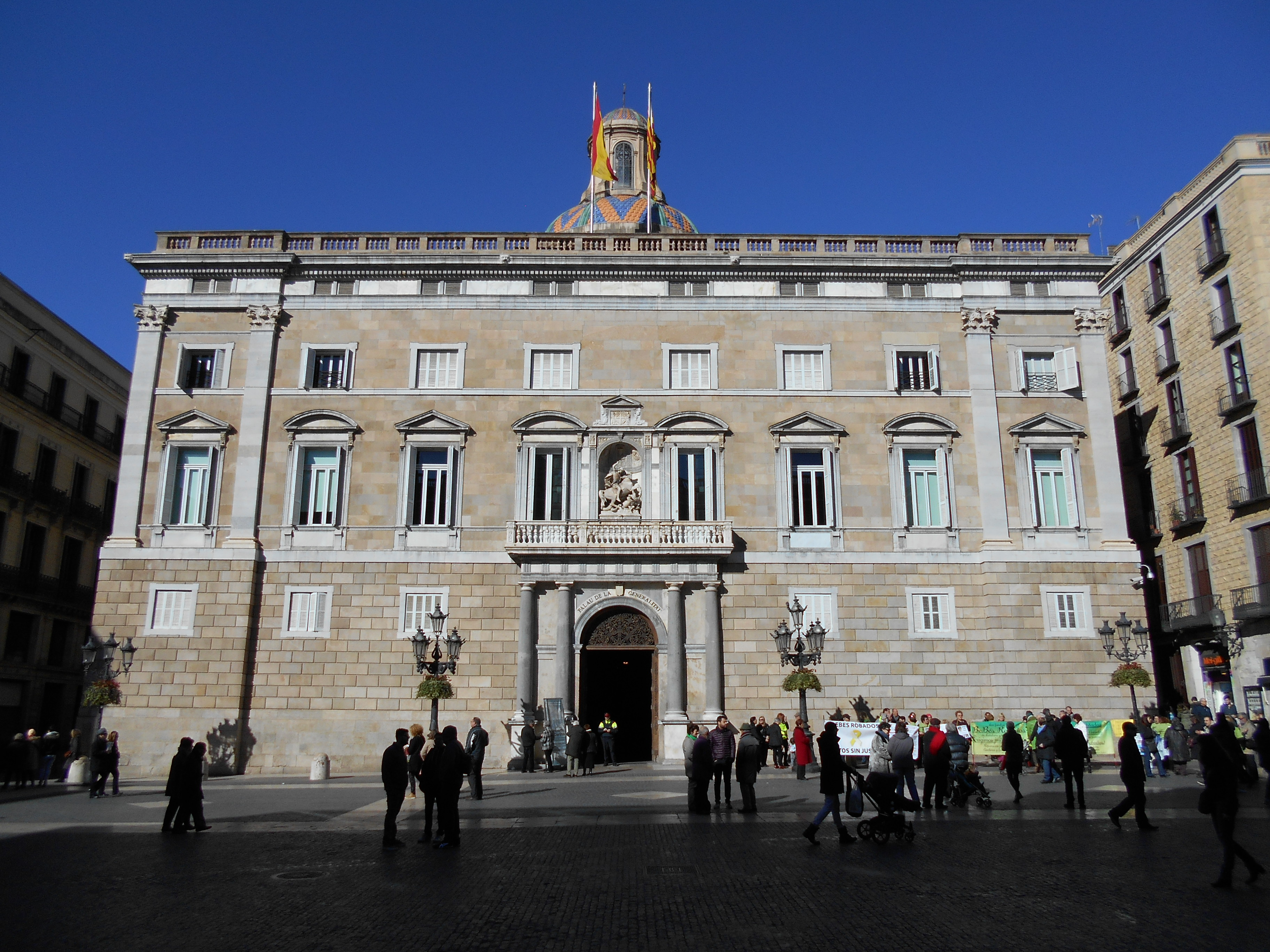 Fachada de la Generalitat.